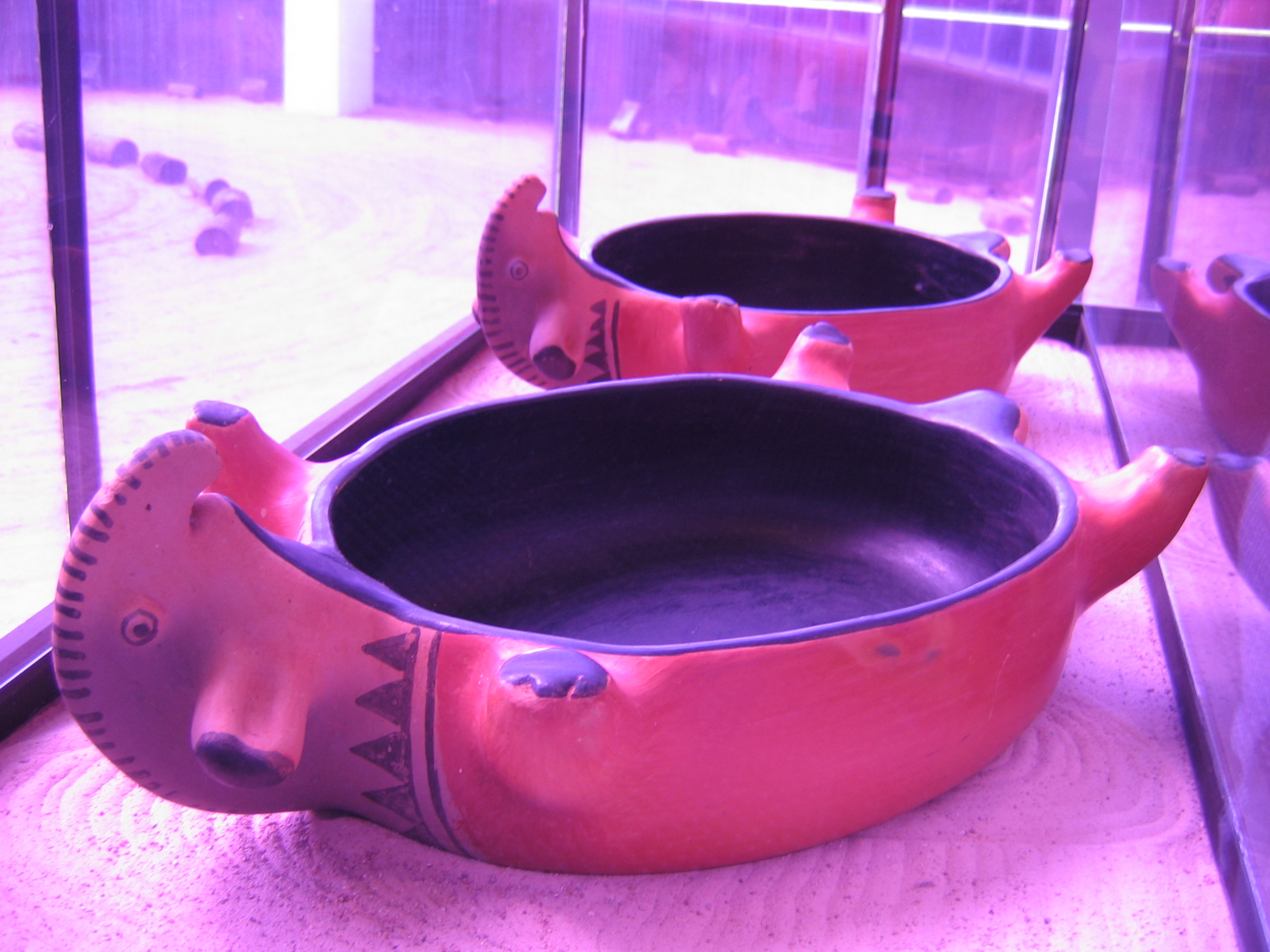 התמונה צולמה על ידי, אורי רוזנהק ביד הזיכרון לעמים הילידים, ברזיליה, ברזיל. החפץ הוא סיר בישול בצורת טפיר של בני ה Mapulu Waura המתגוררים ב- alto Xingu, מאטו גרוסו, ברזיל. מתוך אוסף פרטי, 1994.